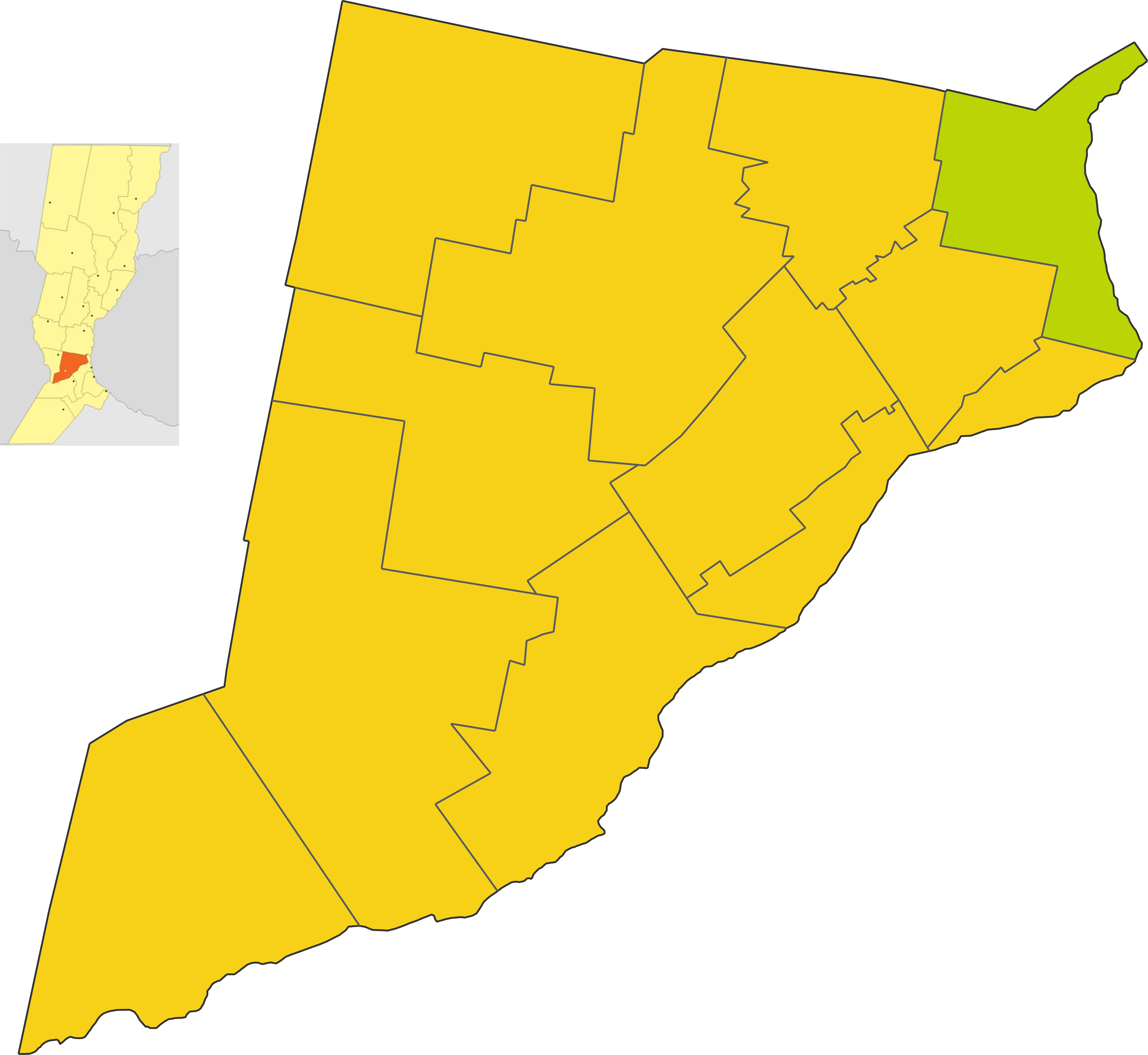 Map of Oliveros's comuna in Iriondo department, Santa Fe, Argentina